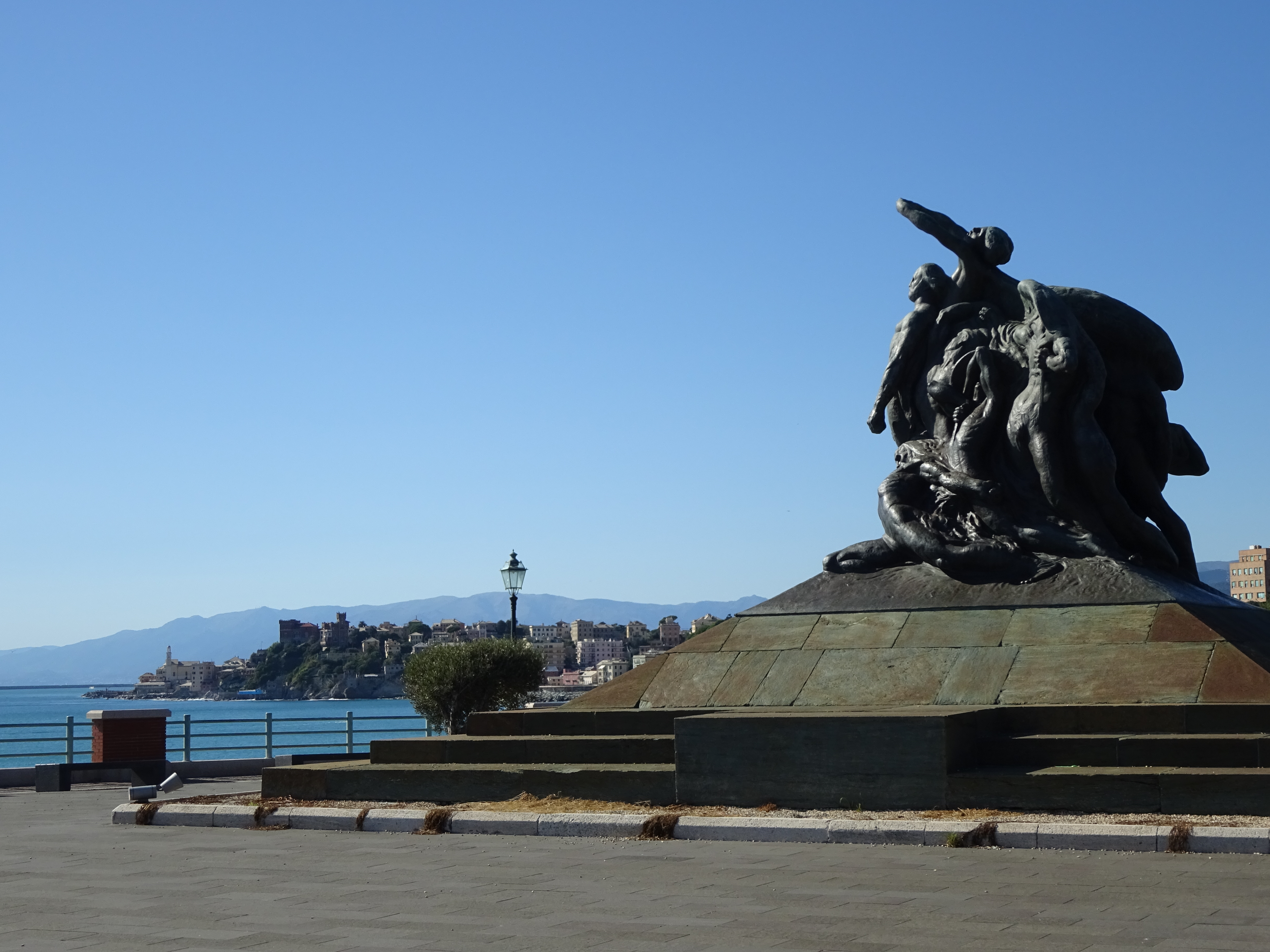 Monumento ai Mille This is a photo of a monument which is part of cultural heritage of Italy.